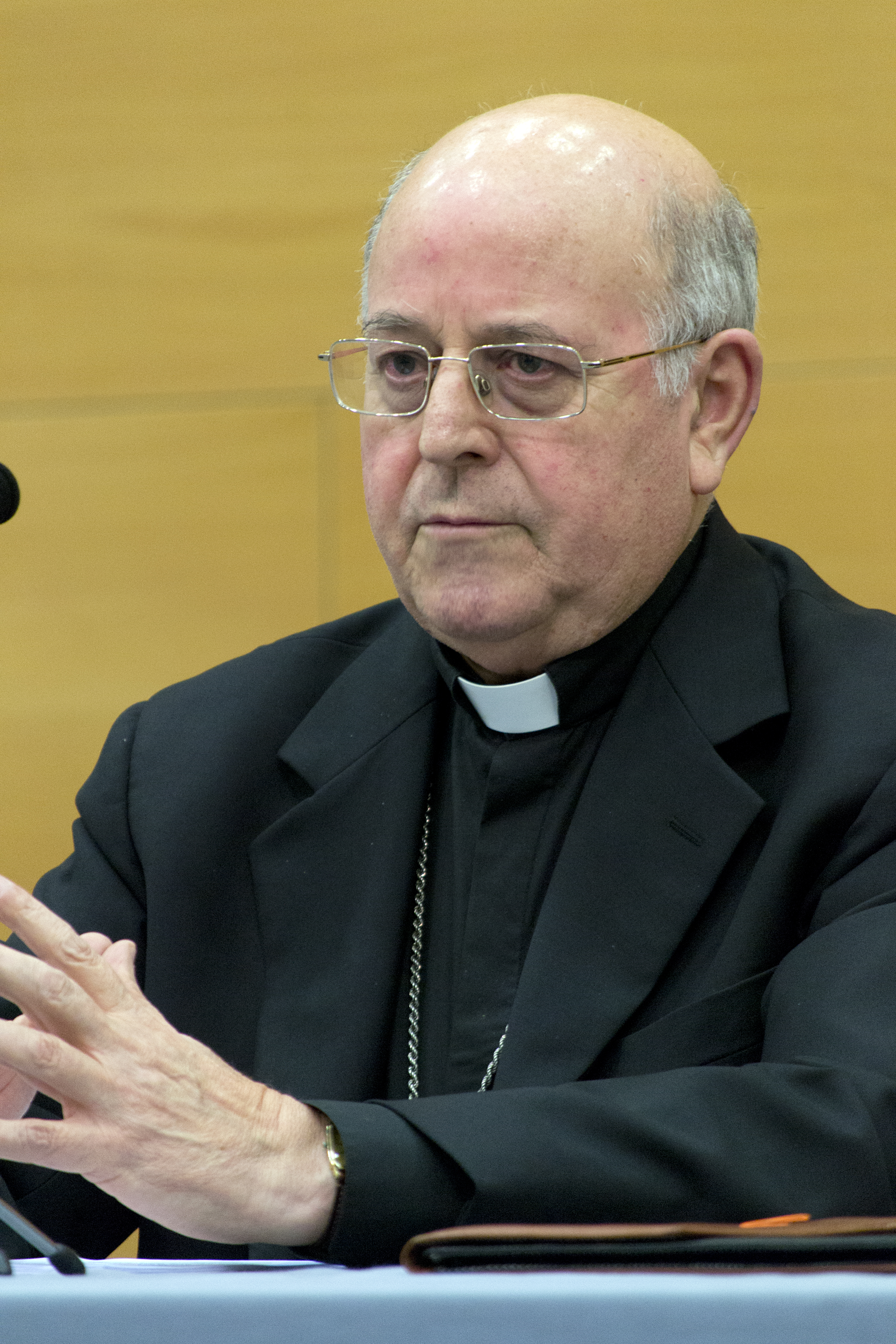 D. Ricardo Blázquez Pérez, Arzobispo de Valladolid en el Estudio Teológico Agustiniano.